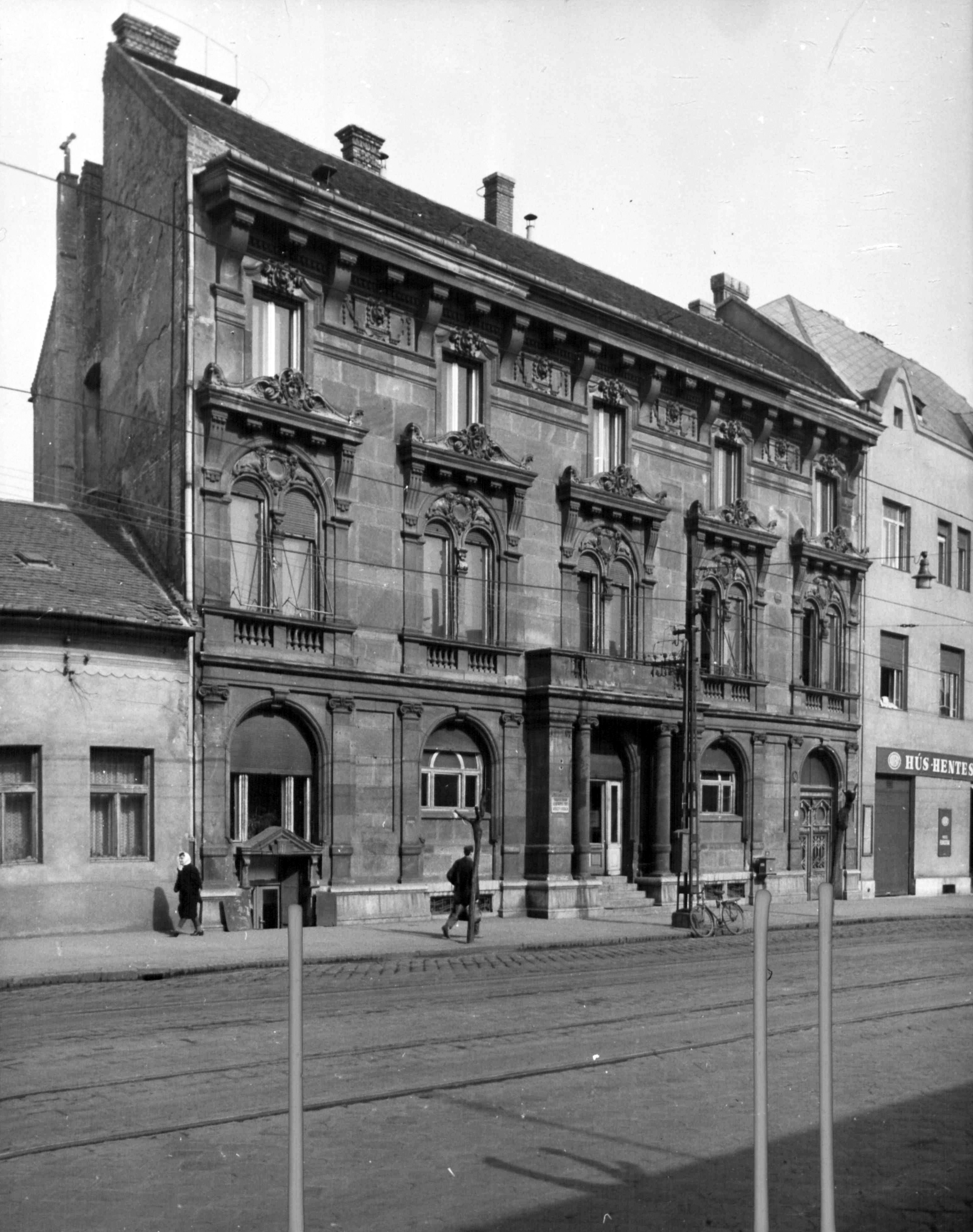 Árpád út 40. A kép forrását kérjük így adja meg: Fortepan / Budapest Főváros Levéltára. Levéltári jelzet: HU_BFL_XV_19_c_11 Location: Hungary, Budapest IV. Tags: Budapest Title: Árpád út 40. A kép forrását kérjük így adja meg: Fortepan / Budapest Főváros Levéltára. Levéltári jelzet: HU_BFL_XV_19_c_11